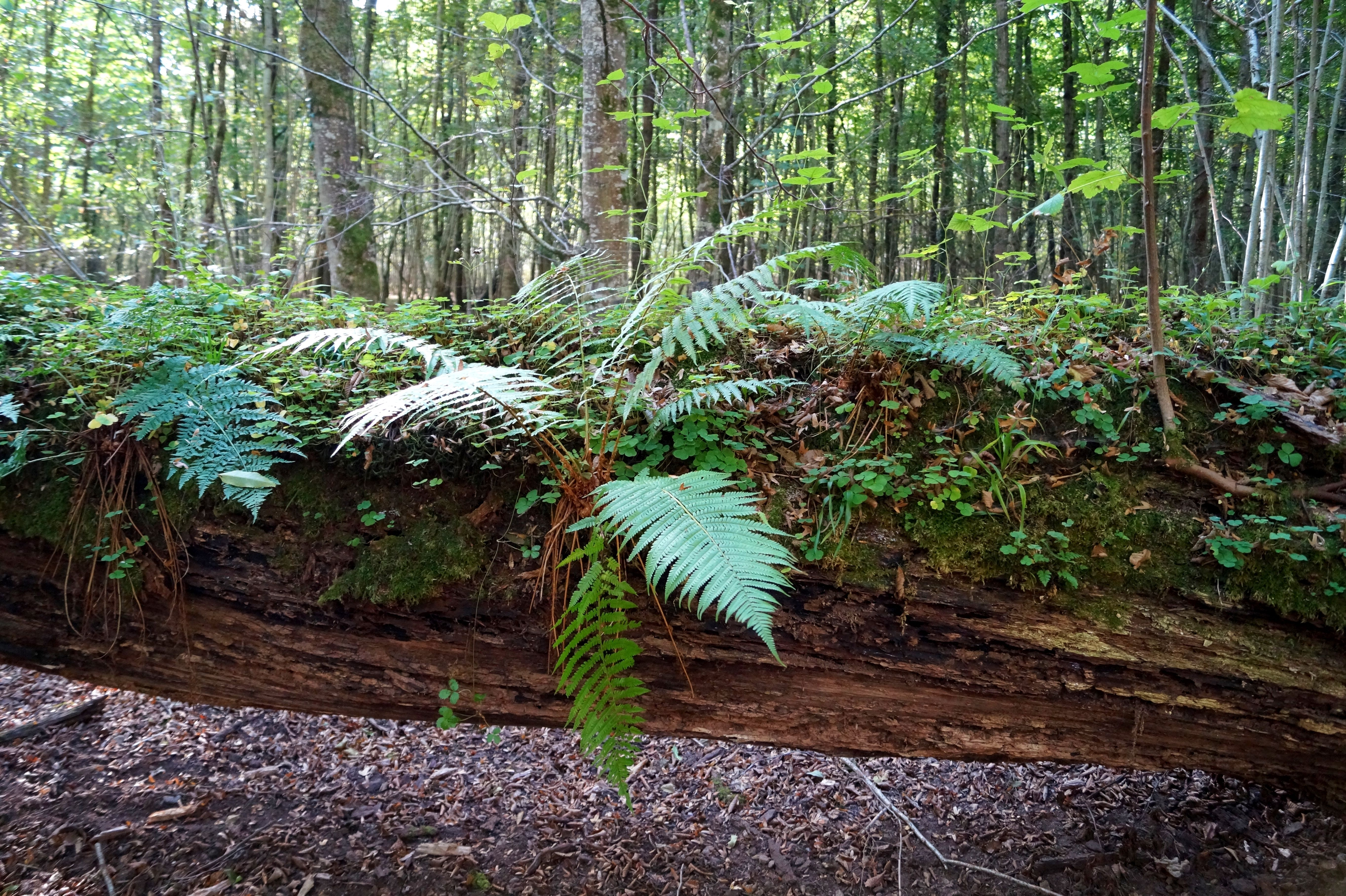 Epiphyt auf Totholz